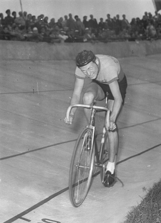 Dieter Lüde Zentralbild Funck 25.9.1955 Ro-Eg. Radrennbahn Weissensee der Öffentlichkeit übergeben Der Stellvertreter des Oberbürgermeisters, Herbert Fechner übergab am 25.9.1955 den Radsportlern Berlins die Radrennbahn Weissensee. Gleich am 1. Tage gab es auf der neuen Bahn eine Reihe interessanter Rennen. Das 4000 Meter Verfolgungsrennen zwischen dem Sieger der diesjährigen DDR-Rundfahrt, Lüder (Empor) und dem zweifachen Etappensieger Jährling (Einheit), konnte Jährling in einem großartigen Spurt gewinnen. UBz:Dieter Lüder während des Rennens.